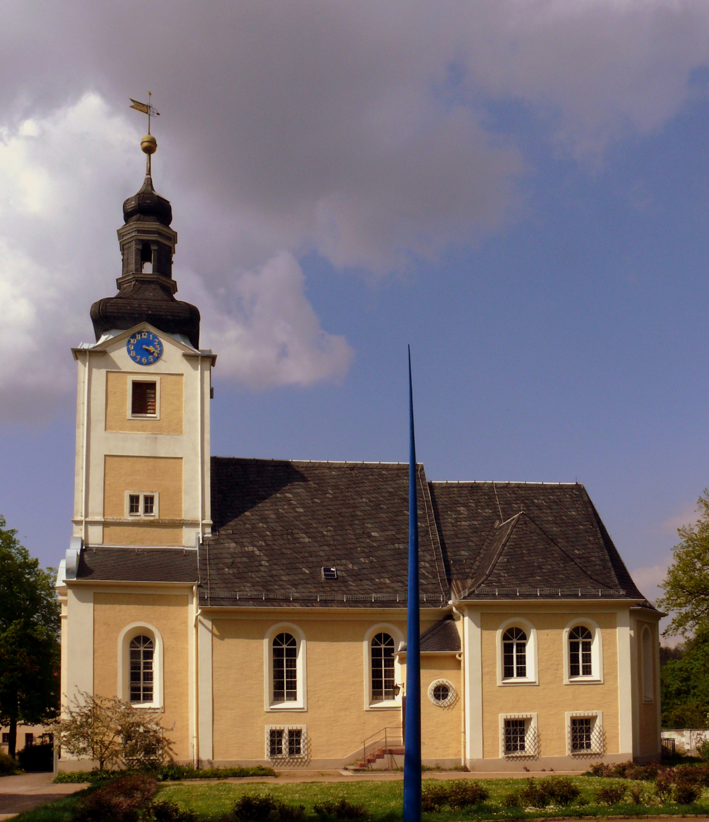 Die Marienkirche in Leipzig-Stötteritz von Süden aus gesehen.